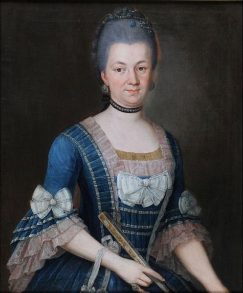 Porträt Catharina Eleonora Charlotte von Lehwaldt, geborene Comtesse zu Eulenburg (* 30. August 1743; † 15. Februar 1824), 3. Ehefrau des preußischen Generalleutnants Baron Wenzeslaus Christoph von Lehwaldt (1717-1793)